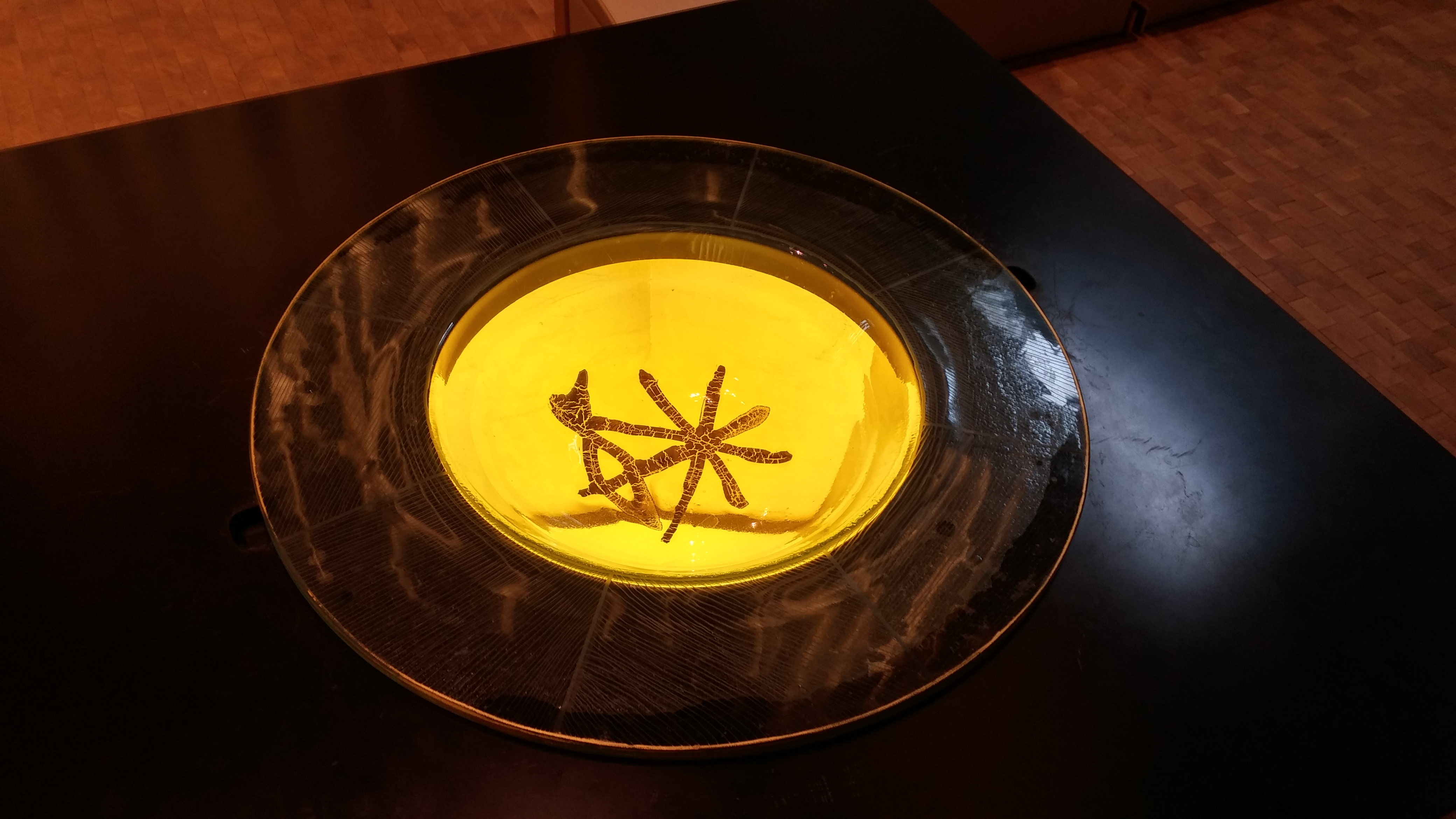 Døpefontenen i Nordlyskatedralen